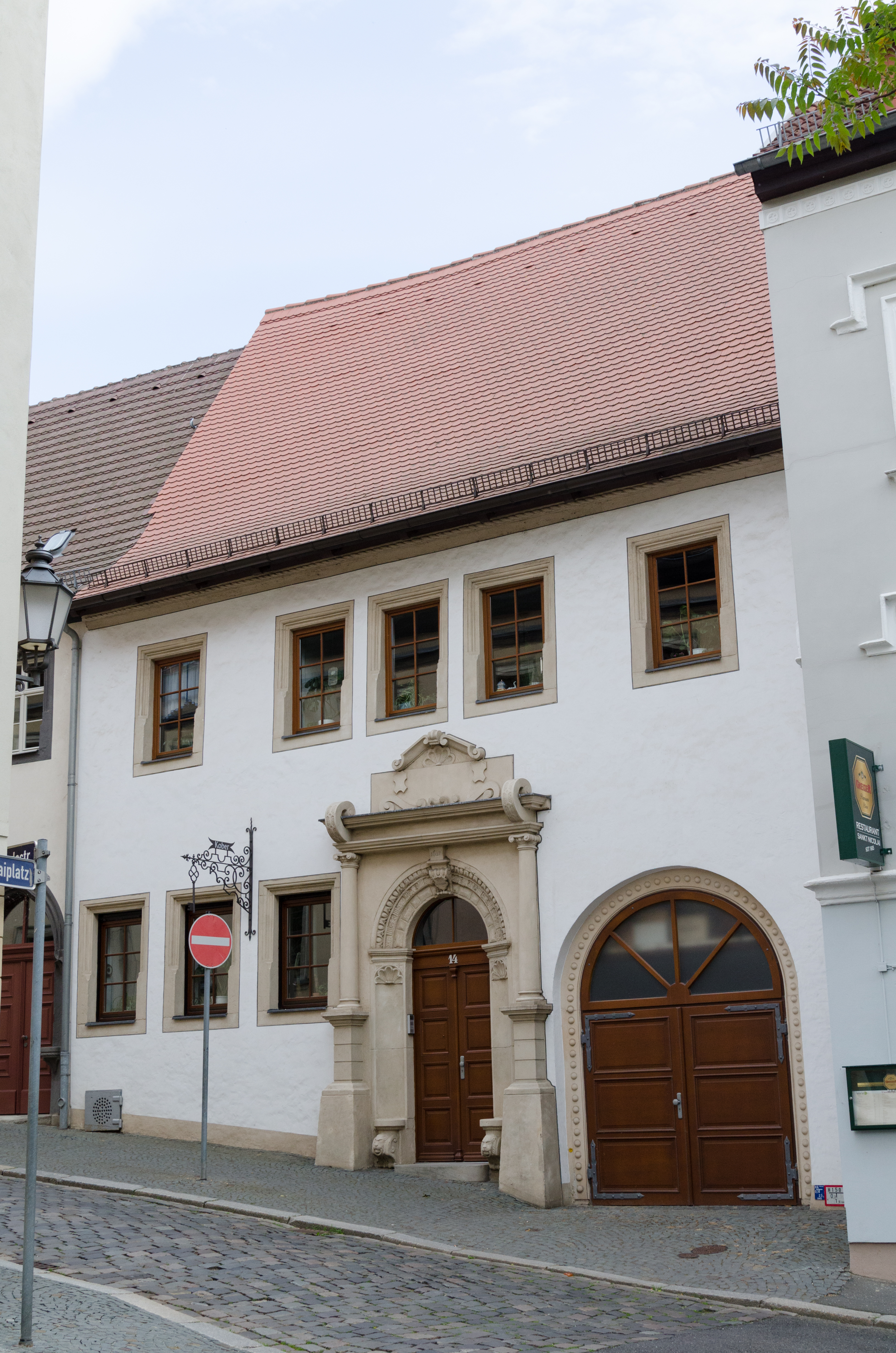 Zeitz, Messerschmiedestraße 14